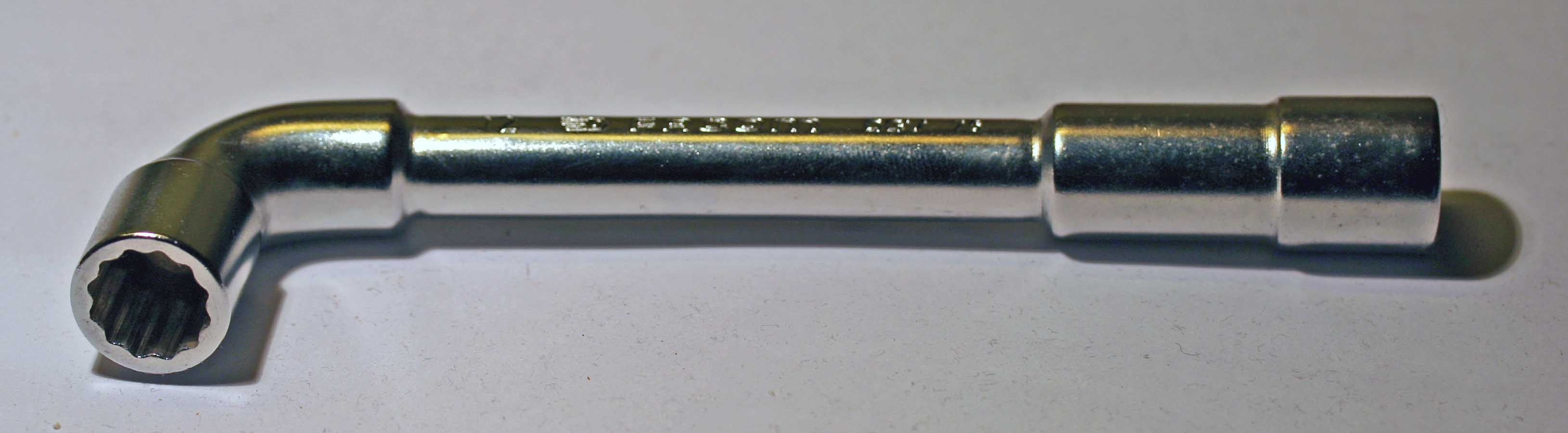 Päifekappschlëssel.